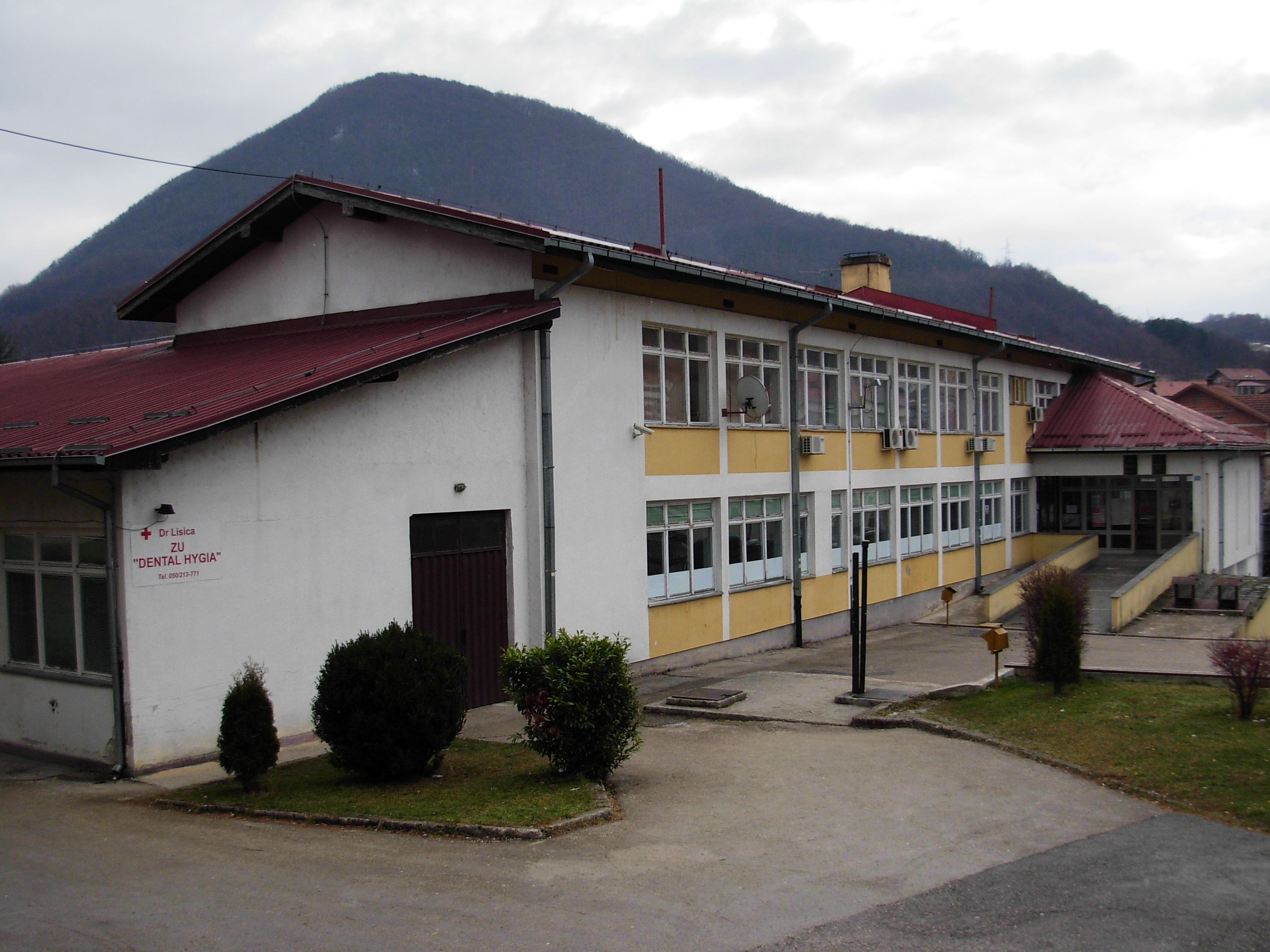 Srednjoškolski centar, Mrkonjić Grad.